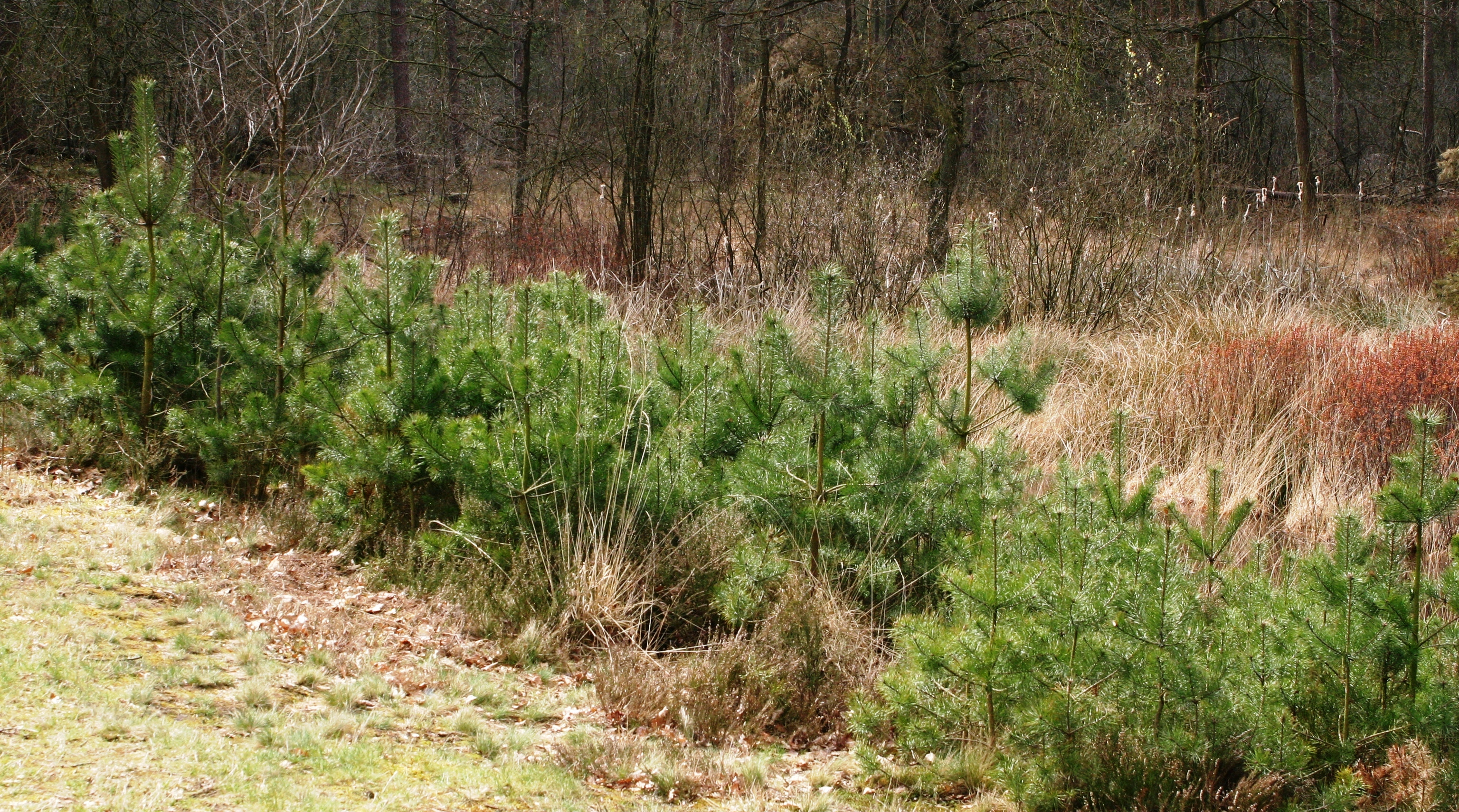 En Usaz vun enger Kiferennaturverjüngung am 3-4 Joer Quell: eege Foto Les Meloures